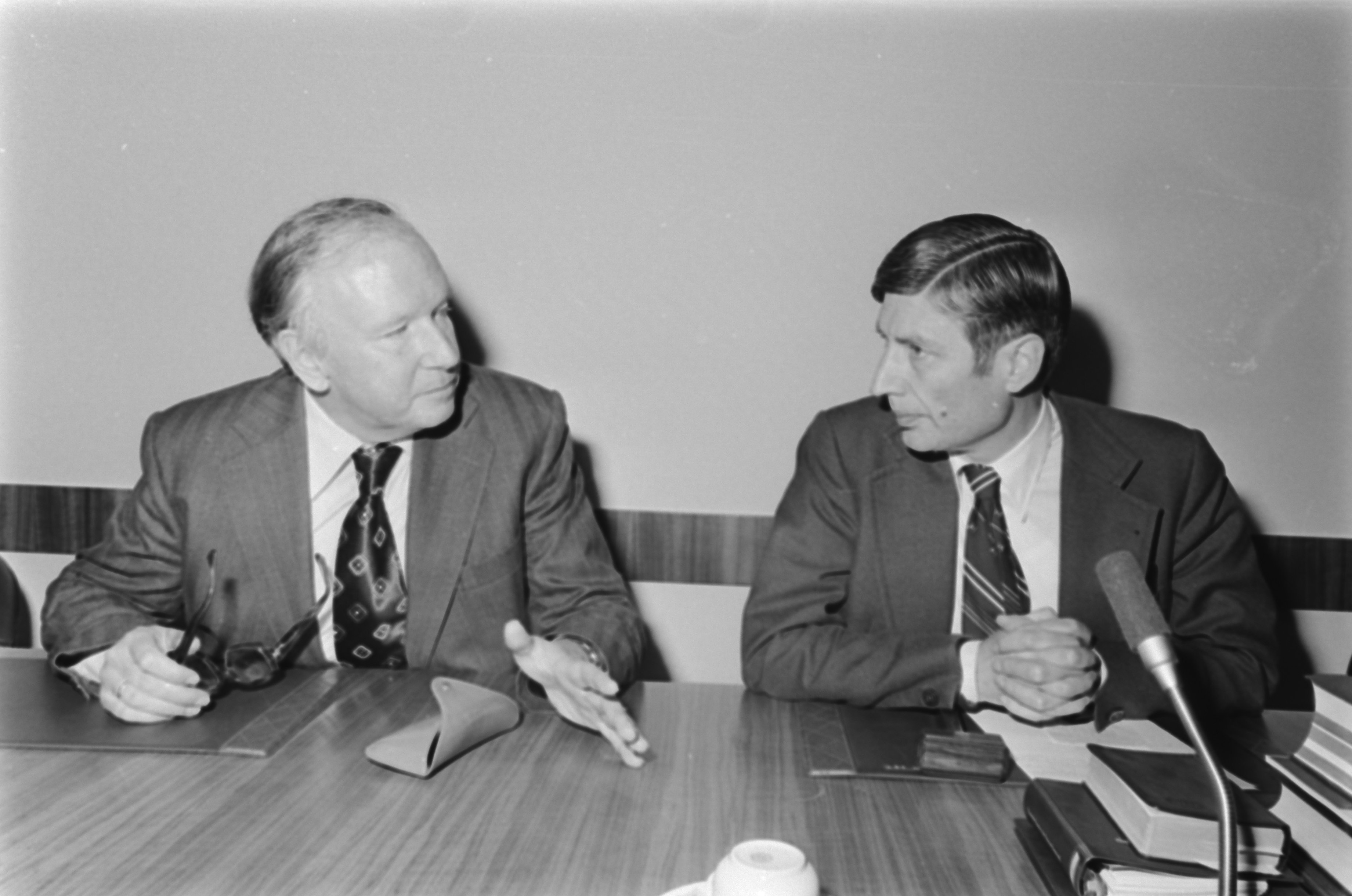 Collectie / Archief : Fotocollectie Anefo Reportage / Serie : [ onbekend ] Beschrijving : Vergadering CDA-fractie over kabinetsformatie; nr. 8, 9 Kruisinga (l) met Van Agt , nr. 10, 11 Van Rooyen (l) Van Agt Datum : 7 oktober 1977 Trefwoorden : Vergaderingen, kabinetsformaties Persoonsnaam : Kruisinga, Roelof Fotograaf : Peters, Hans / Anefo Auteursrechthebbende : Nationaal Archief Materiaalsoort : Negatief (zwart/wit) Nummer archiefinventaris : bekijk toegang 2.24.01.05 Bestanddeelnummer : 929-3810